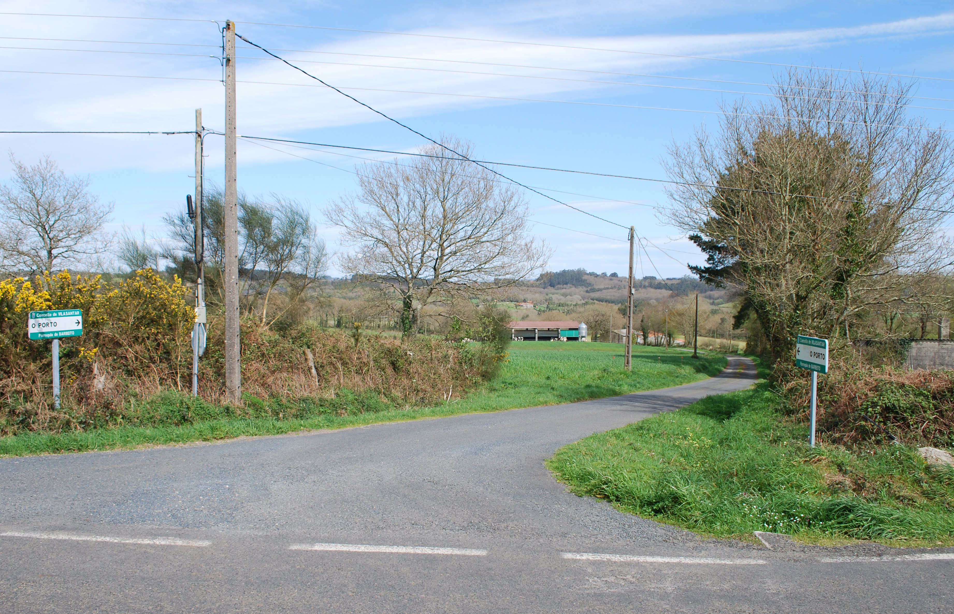 O Porto Barbeito Concello de Vilasantar A Coruña Galiza